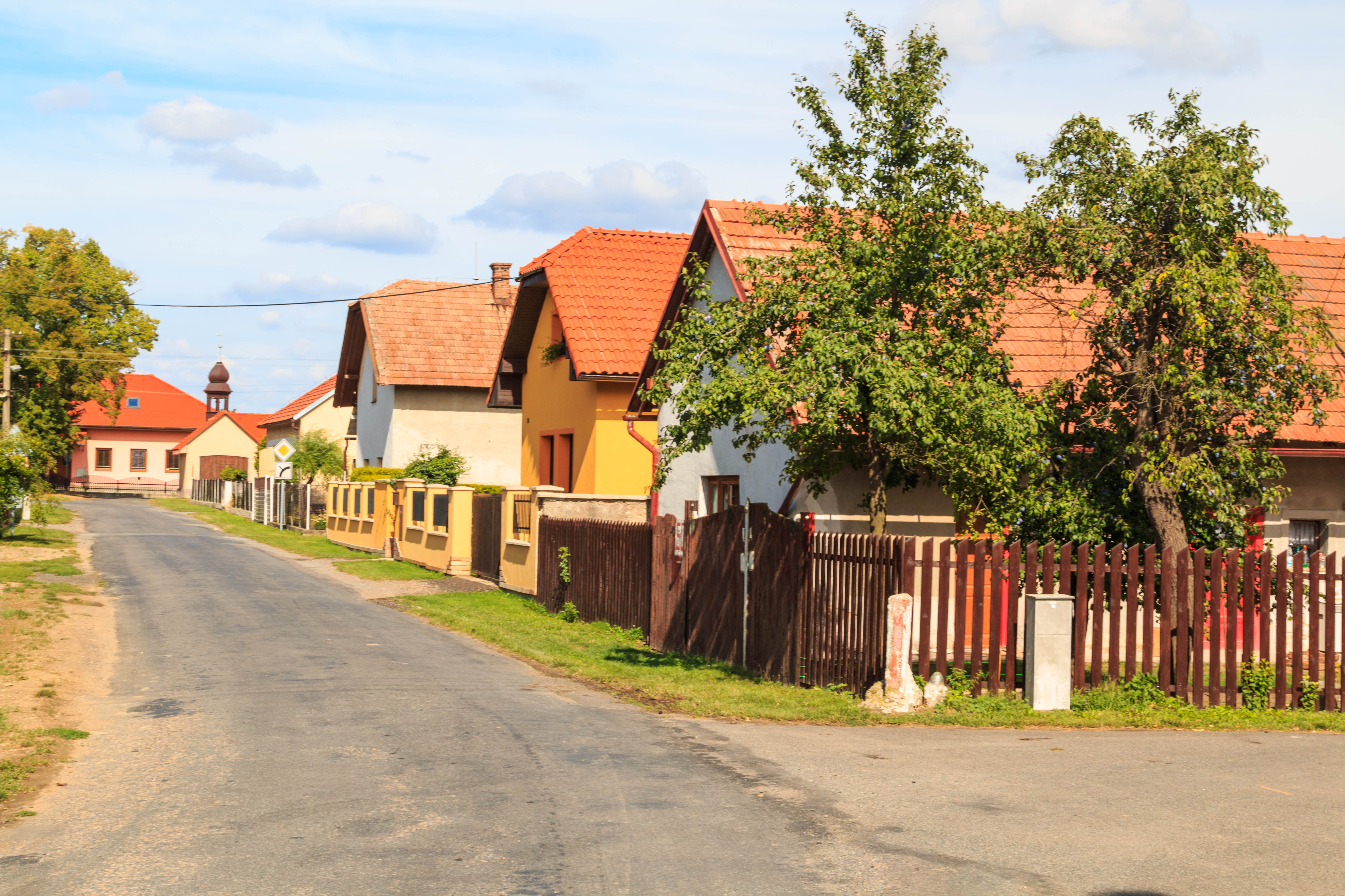 Bořice čp. 50